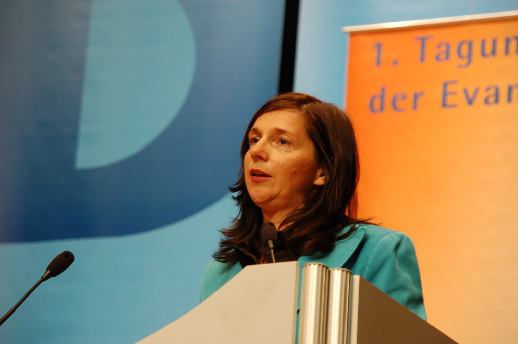 Katrin Göring-Eckardt, deutsche Politikerin (Bündnis 90/Die Grünen) und 2009–2015 Präses der Synode der Evangelische Kirche in Deutschland (EKD) (hier bei der Kandidatenvorstellung für das Präses-Amt, bei der EKD-Synode im April/Mai 2009 in Würzburg, Deutschland).